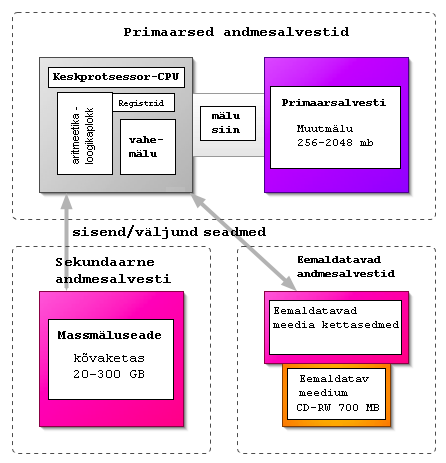 Personaalarvuti andmete salvestamise tüübid